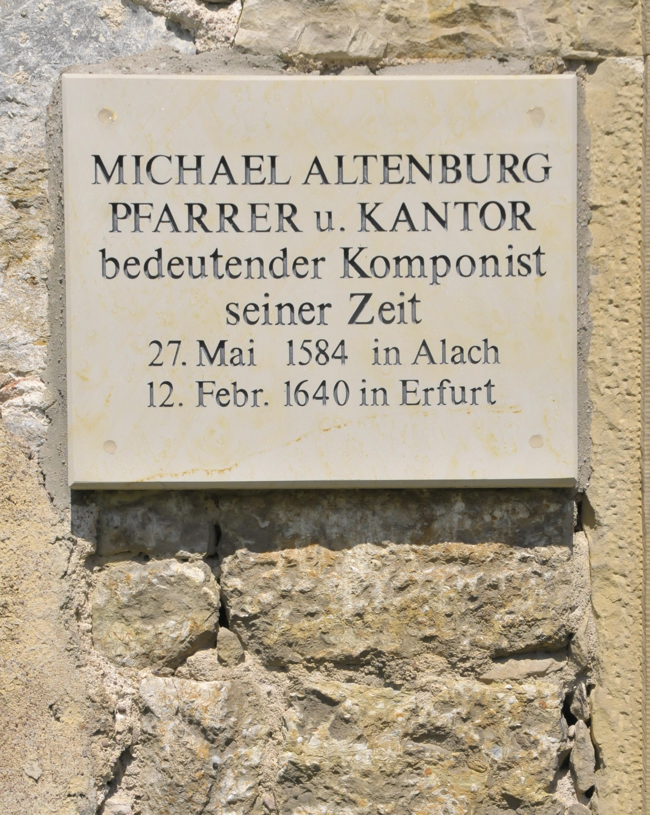 Alach, Gdenktafel für Altenburg an der Kirche